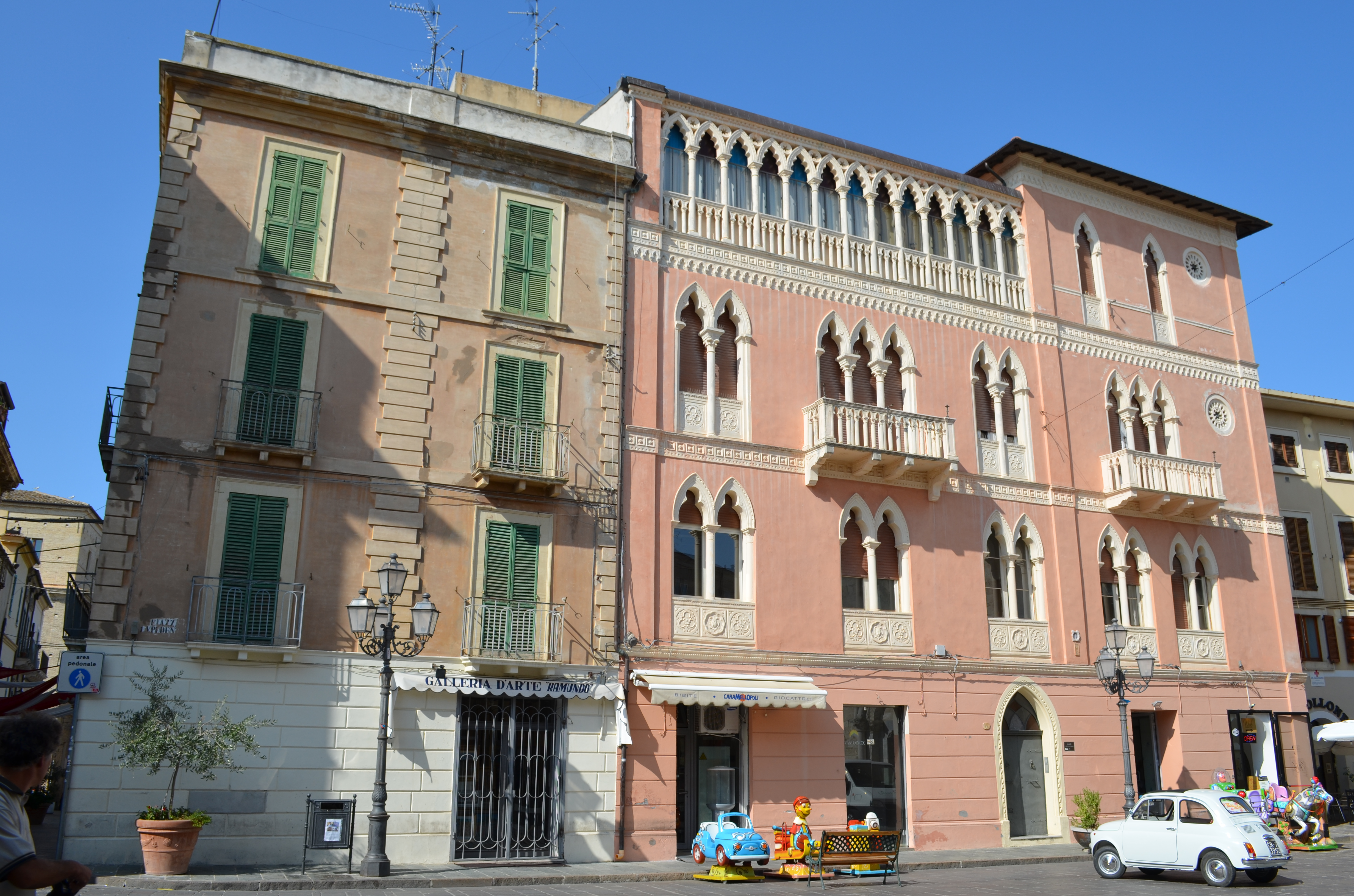 Palazzo Ritucci Chinni a Vasto, Provincia di Chieti This is a photo of a monument which is part of cultural heritage of Italy.